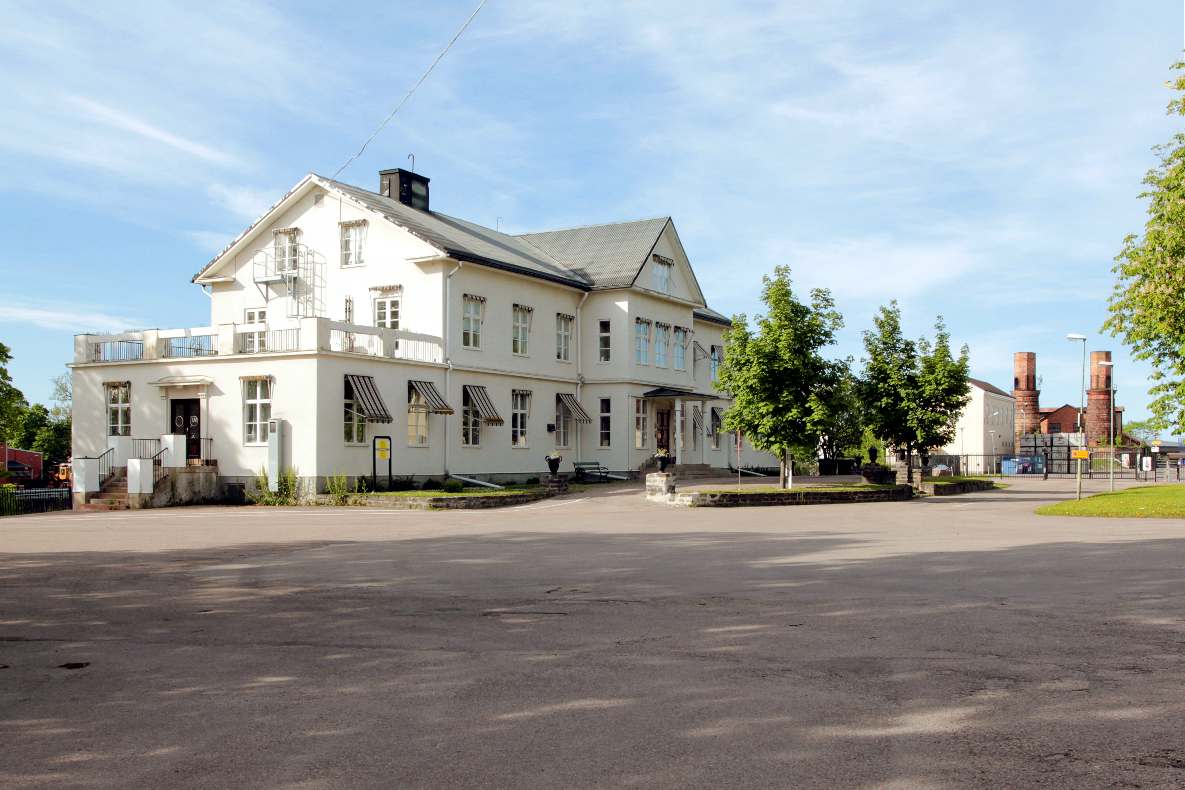 Söderfors bruk. Foto uppladdat som en del i Bergslagssafarin 26 maj 2012.